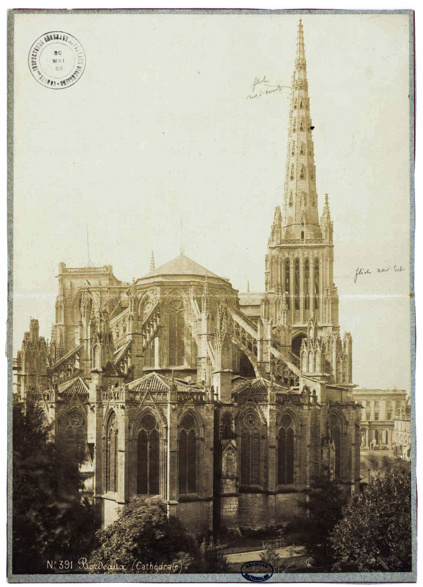 Vue de la cathédrale de Bordeaux depuis le chevet avec arbres au premier plan. Photographié par Séraphin Médéric Mieusement. Inscription manuscrite au crayon graphite au recto : flèche nord-ouest et flèche nord-est ; timbre humide du Comité des inspecteurs généraux des édifices diocésains (30 mai 1888) ; timbre sec du photographe en bas à gauche : MIEUSEUMENT Photographe ; en clair sur le recto N°391 Bordeaux (Cathédrale). Échelle : 0,1 cm / 1 m. Photographie issue des dossiers de travaux de restauration des cathédrales (1802-1912, conservés aux Archives nationales (inventaire et documents numérisés consultables en ligne).